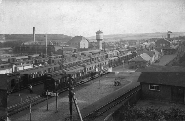 Langå station på en travl dag i 1912. Perspektiv mod syd.